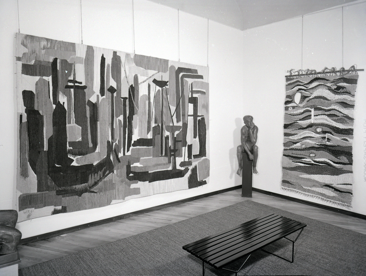 Servizio fotografico : Italia, 1963 / Paolo Monti. - Buste: 7, Fototipi: 7 : Negativo b/n, gelatina bromuro d'argento/ pellicola ; 10x12. - ((Serie costituita da 7 buste sciolte di negativi identificati con una doppia numerazione (da 45653 a 46056): 25222, 25223, 25224, 25380, 25381, 25382, 25383. - La doppia numerazione potrebbe corrispondere ai lavori realizzati durante il periodo di attività del laboratorio e studio fotografico "Foto Studio 22", società che risulta essere stata aperta il 10/04/1961, con partecipazione, nel ruolo di gerente, di Vincenzo Carrese. - Nella rubrica citata nel campo Fonti in corrispondenza degli estremi numerici identificativi della serie iscrizione didascalica manoscritta: "Galleria Naviglio: Arazzi". - Fonte: Rubrica di Paolo Monti: Archivio fino 1-4-1961/ 31-3-1963 (1961-1963), presso Archivio Paolo Monti